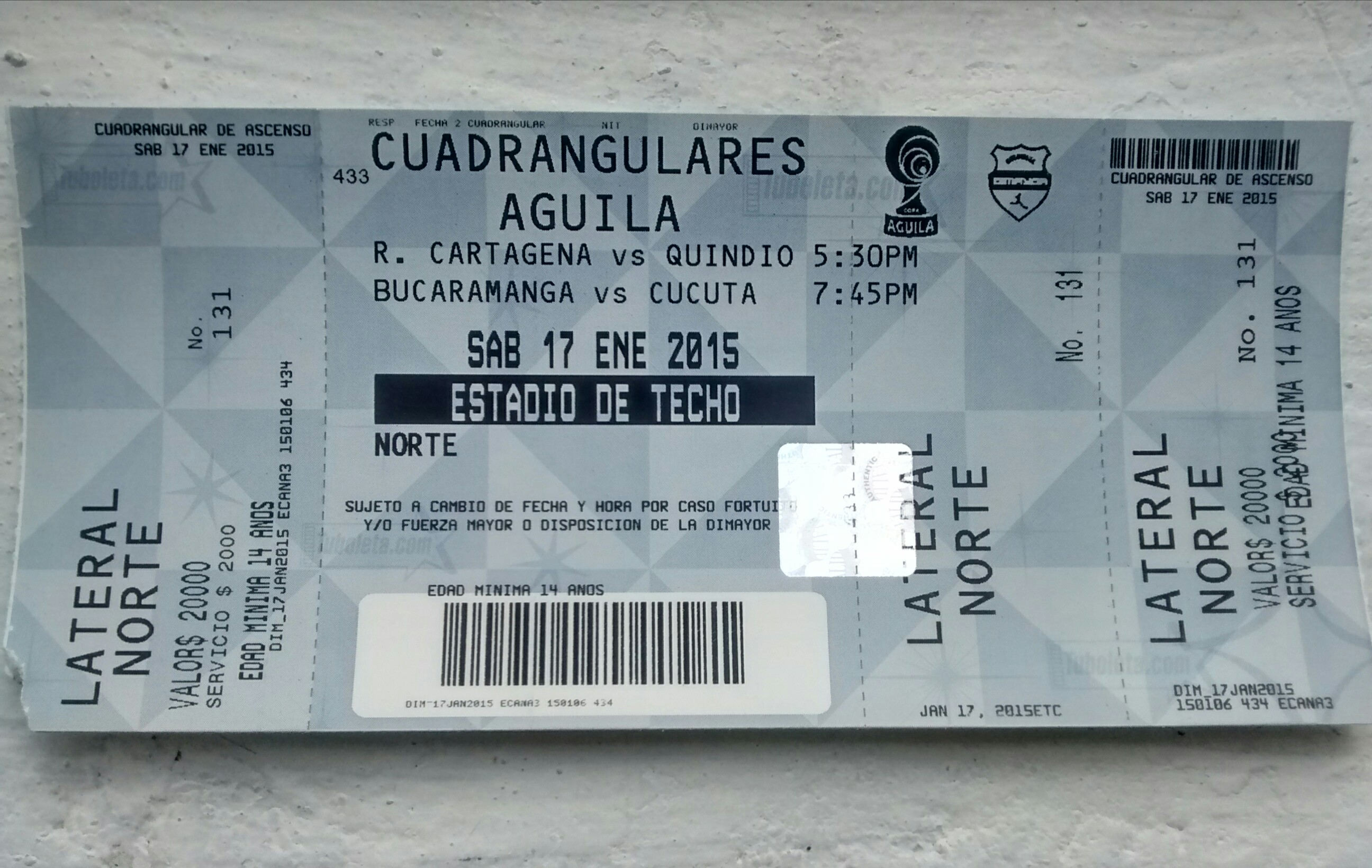 Ejemplar de boleta para los partidos a disputarse en el estadio Metropolitano de Techo, de Bogotá, en el día 17 de enero válido por los Cuadrangulares de Ascenso de 2015.